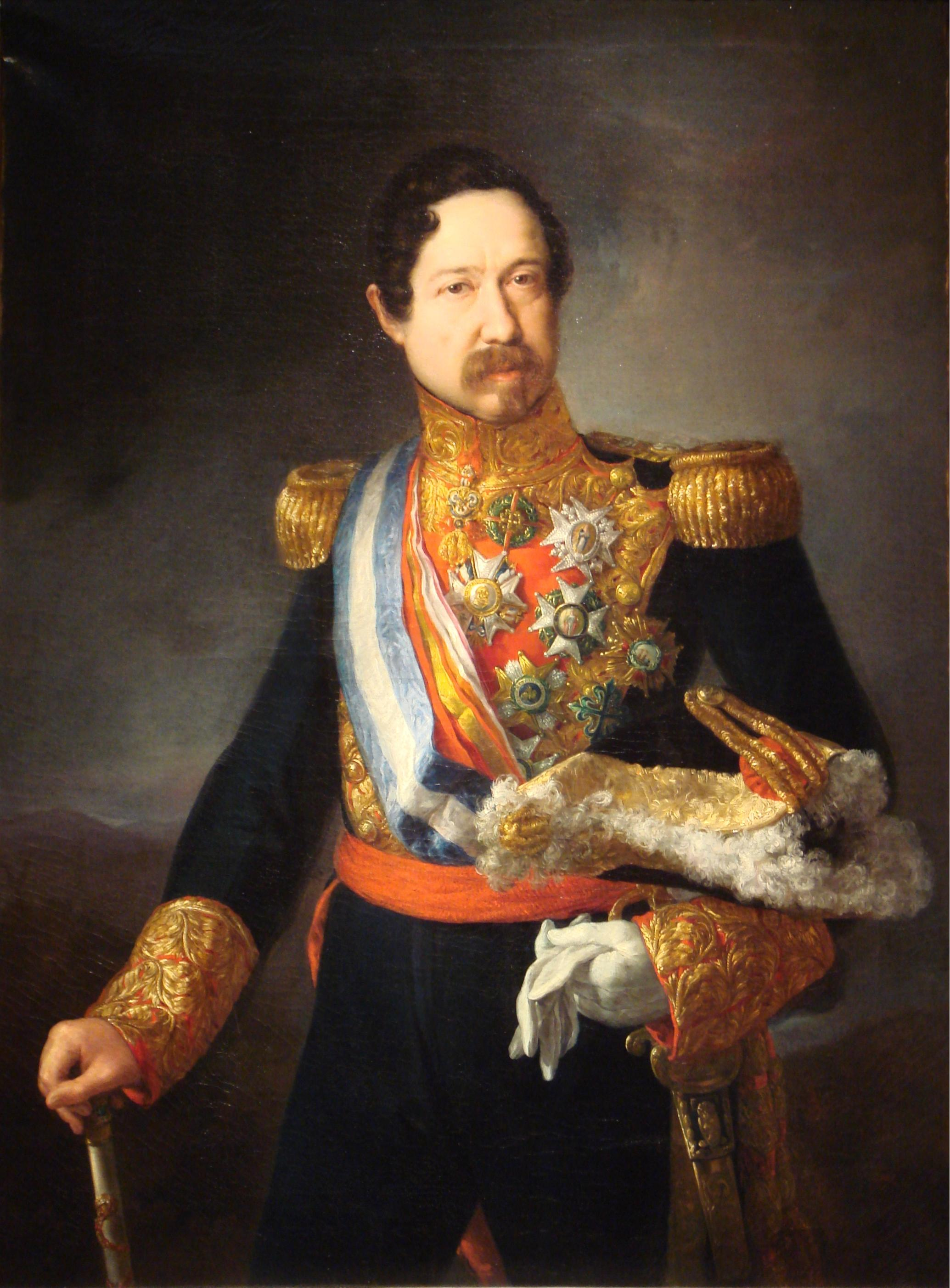 Retrato del militar y político español Ramon Maria Narváez (1800-1868), conocido como el Espadón de Loja y presidente del Consejo de Ministros de España en varias ocasiones durante el reinado de Isabel II.